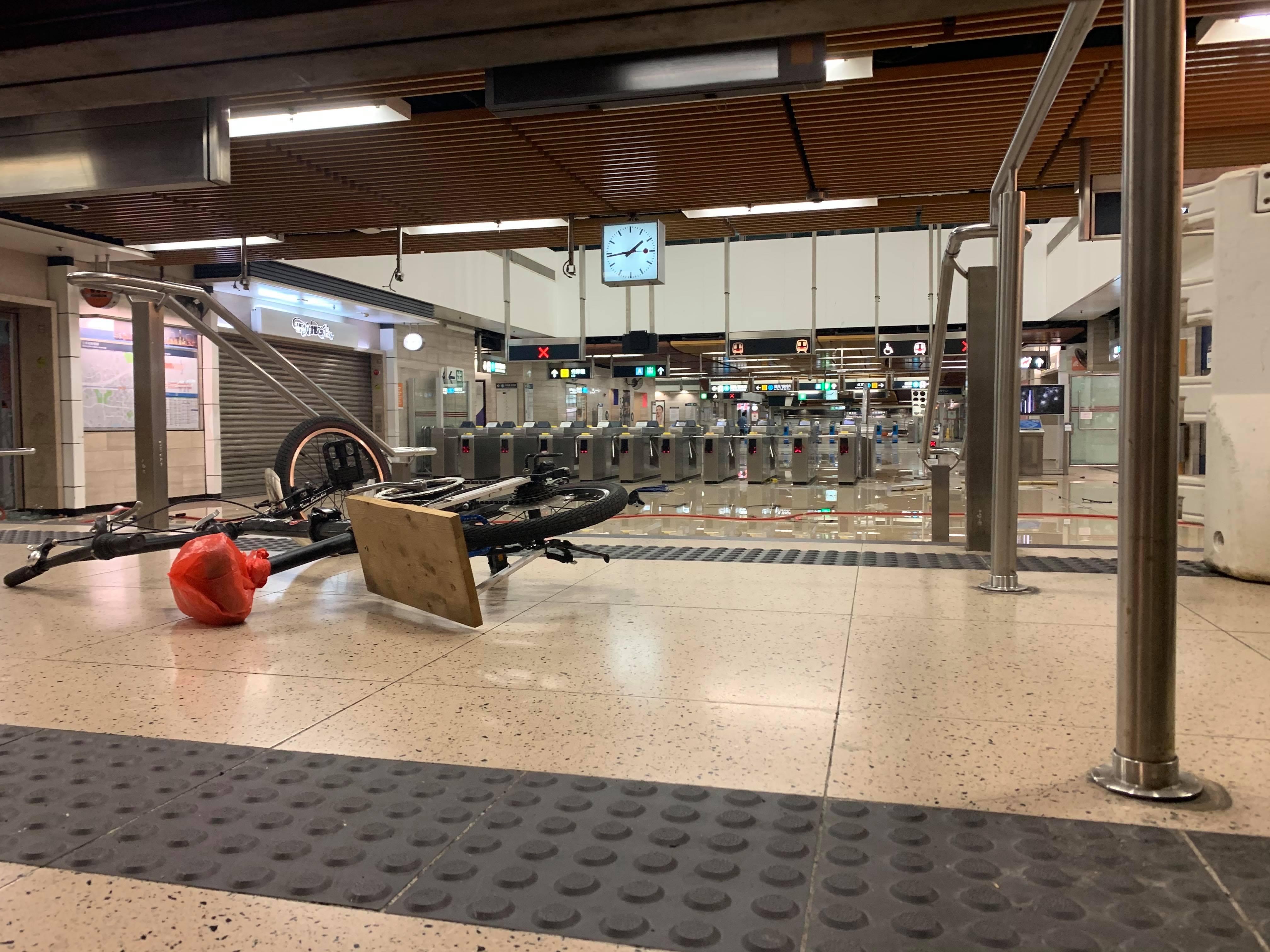 2019-10-04 Protesten in Hong Kong